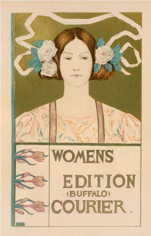 Affiche américaine pour la 'Women's edition Buffalo Courier'